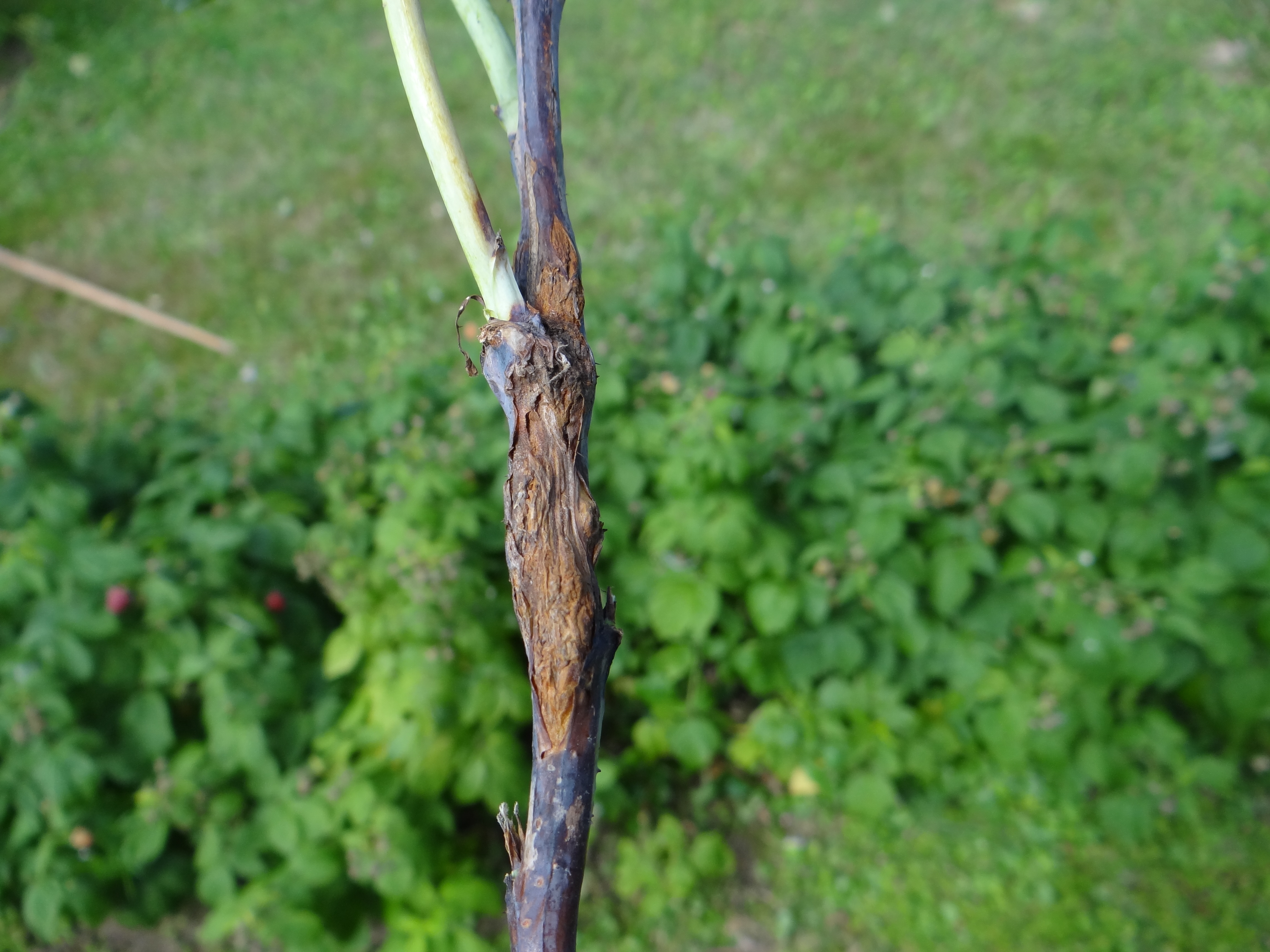 Didymella applanata on Rubus